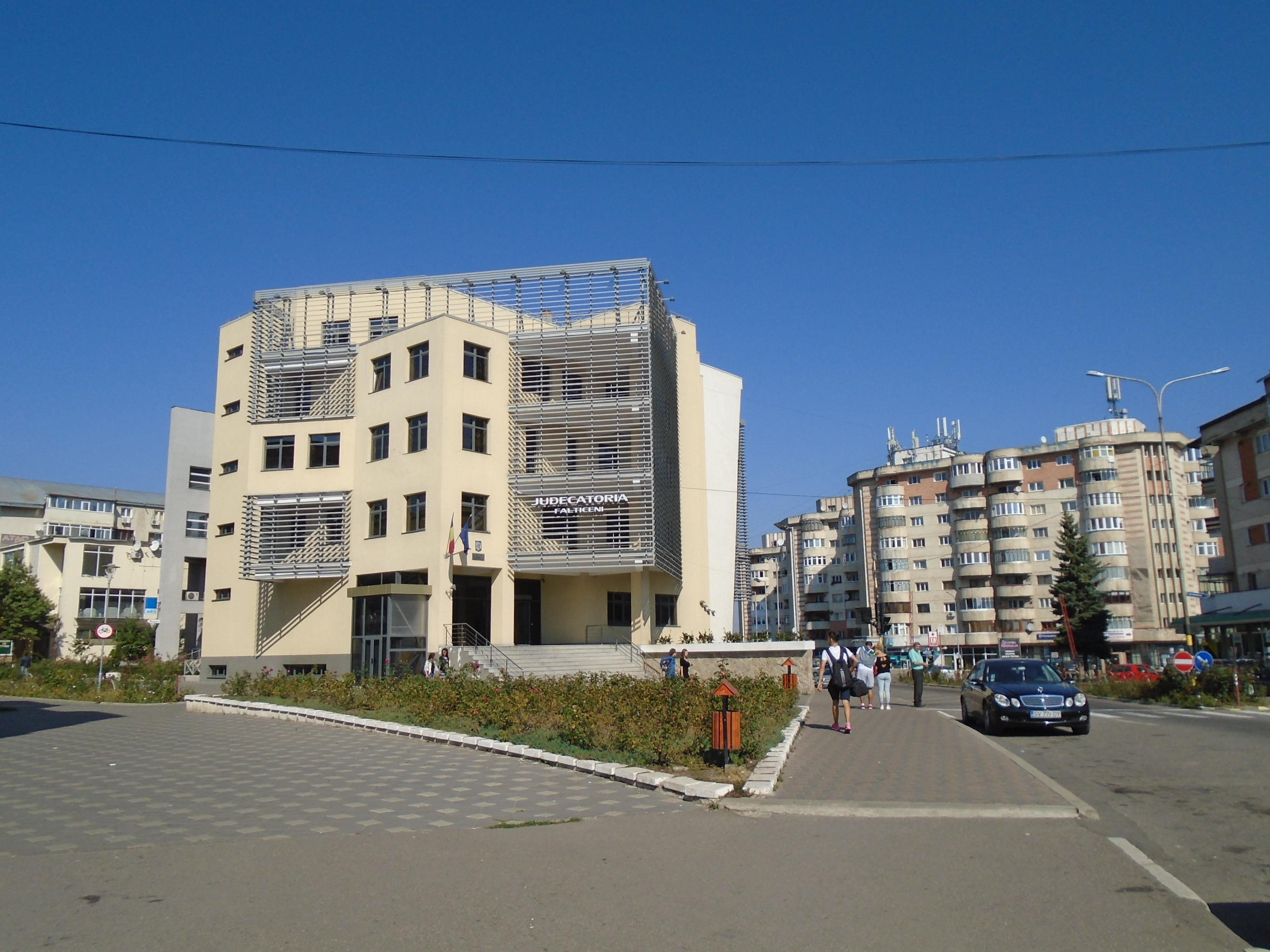 Vedere din zona centrală a Fălticeniului, în prim plan, clădirea Judecătoriei